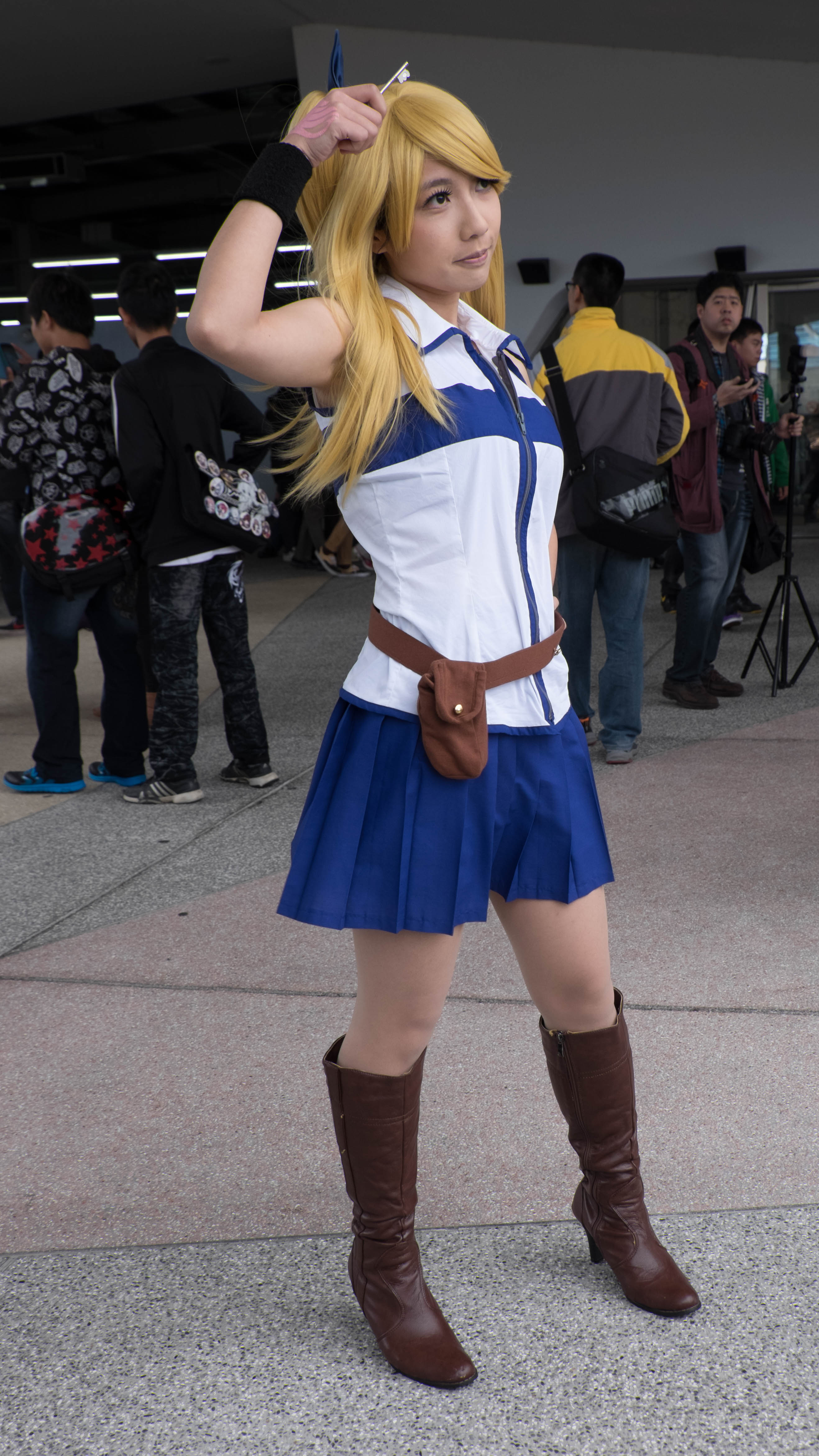 Fancy Frontier 25首日下午，＜Fairy Tail＞露西·哈特菲利亞Cosplayer。